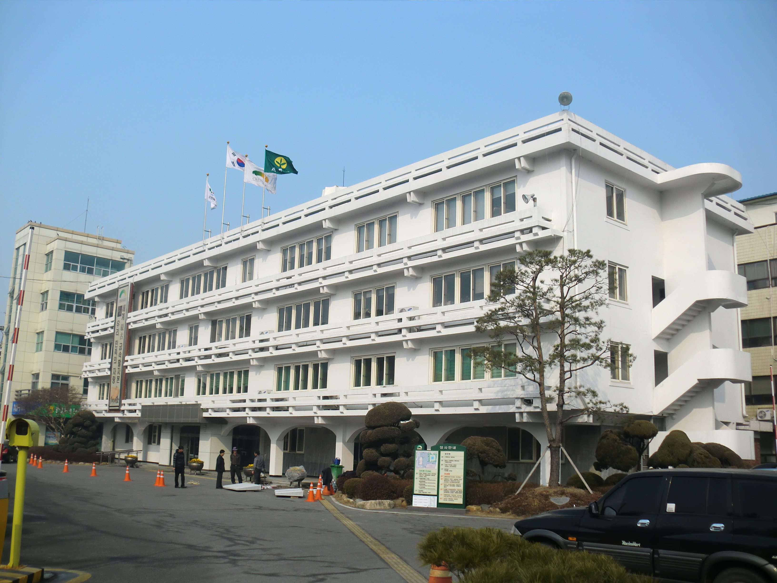 충청북도 청주시에 있는 청주시청